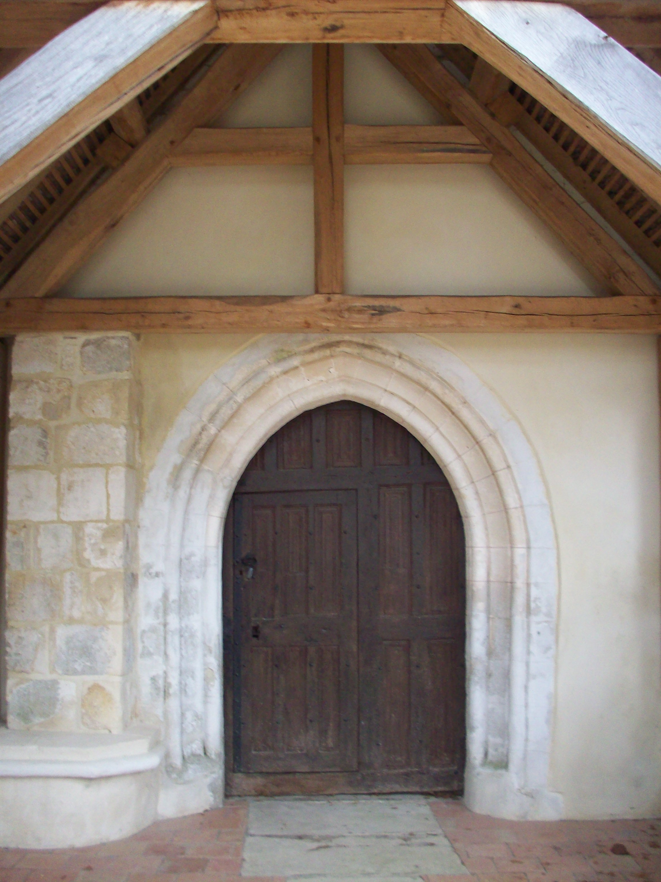 Église de Bosrobert